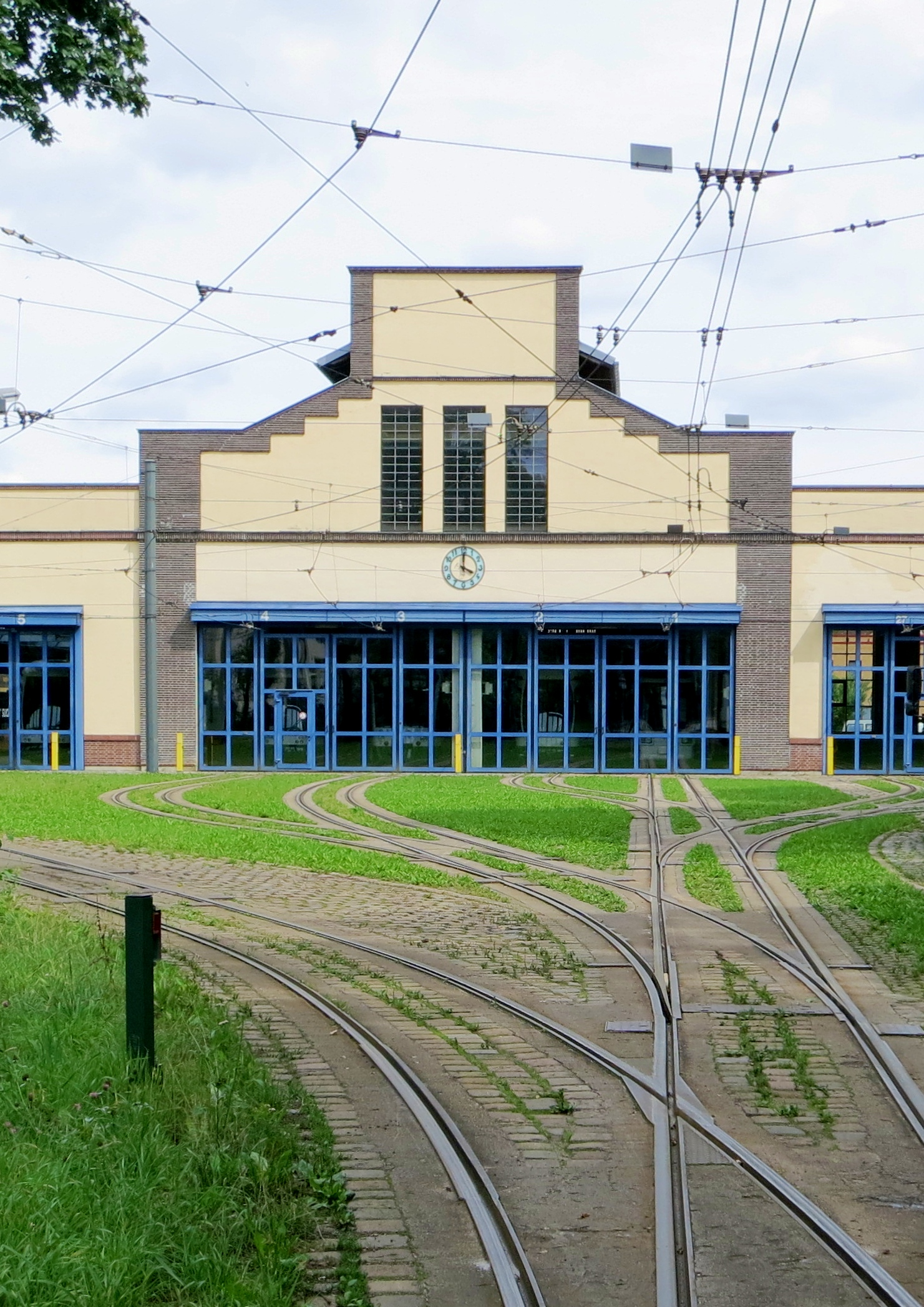 Bahnhof in Augsburg der München-Augsburger Eisenbahn-Gesellschaft aus NordWest